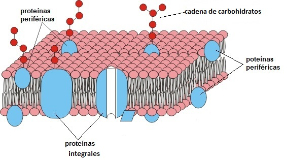 proteínas de membrana